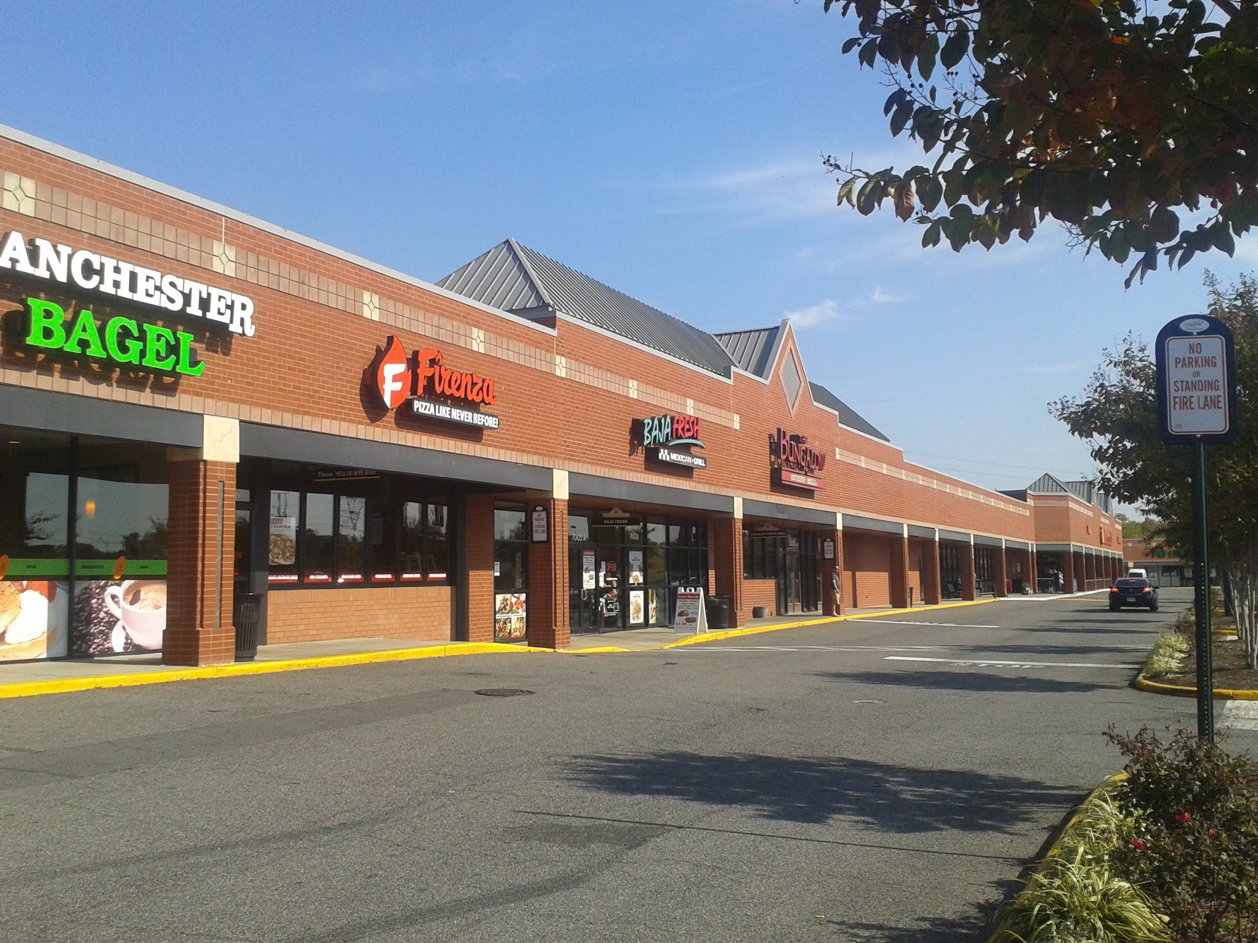 Shopping center in Franconia, Virginia